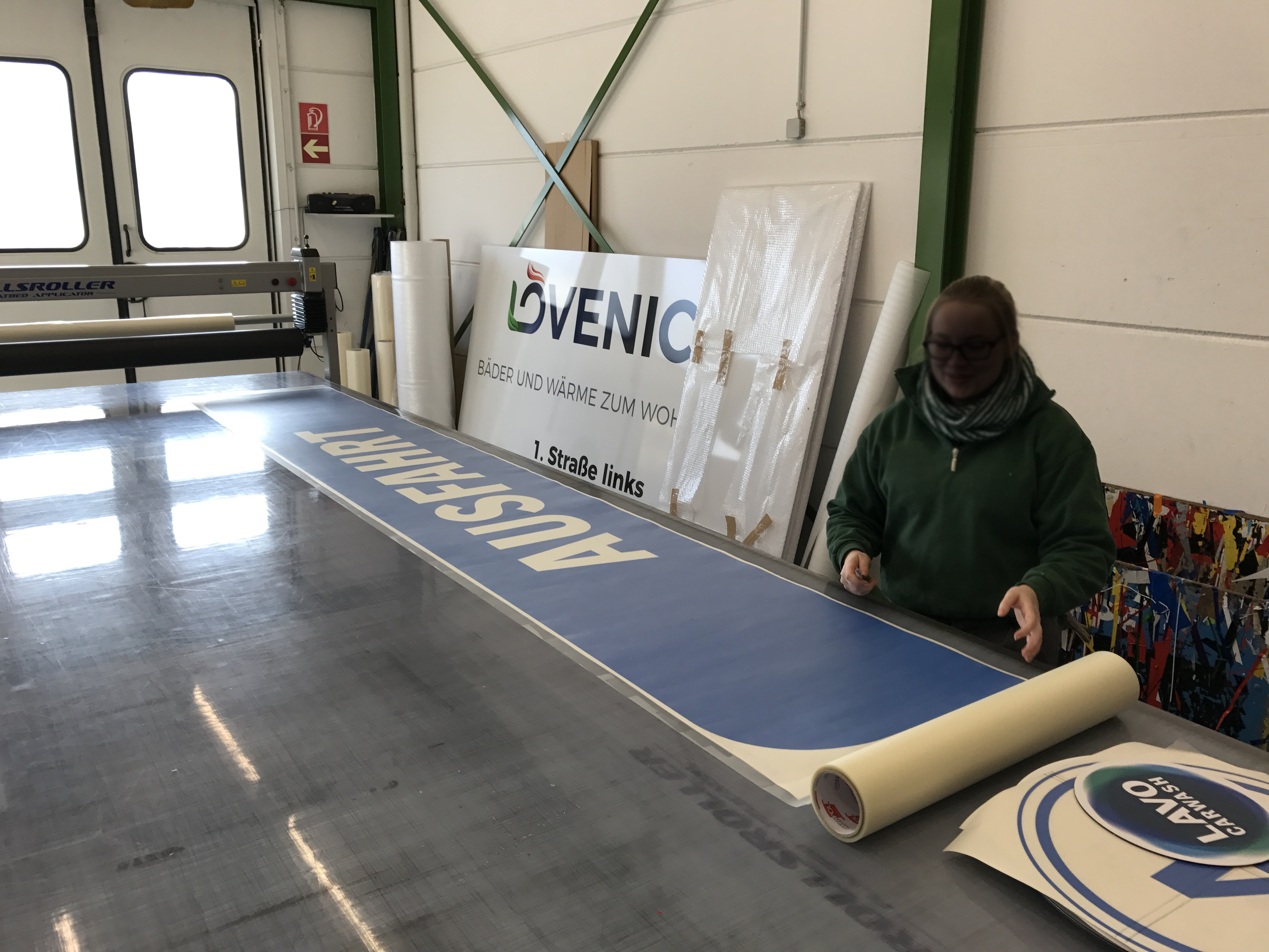 Beschriftung eines Aluminumverbundschildes mittel Hochleistungsfolie erstellt im Folienplott.